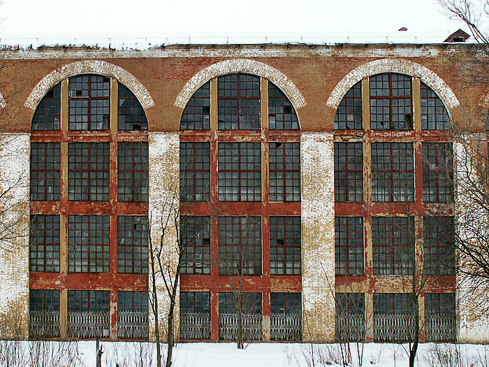 Вичуга. Бетонный корпус ткацкого производства, 1913-1915, арх. Брюханов